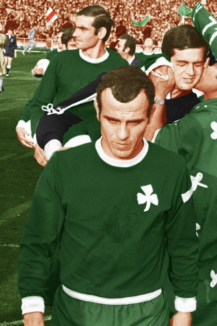 Elftallen komen het veld op